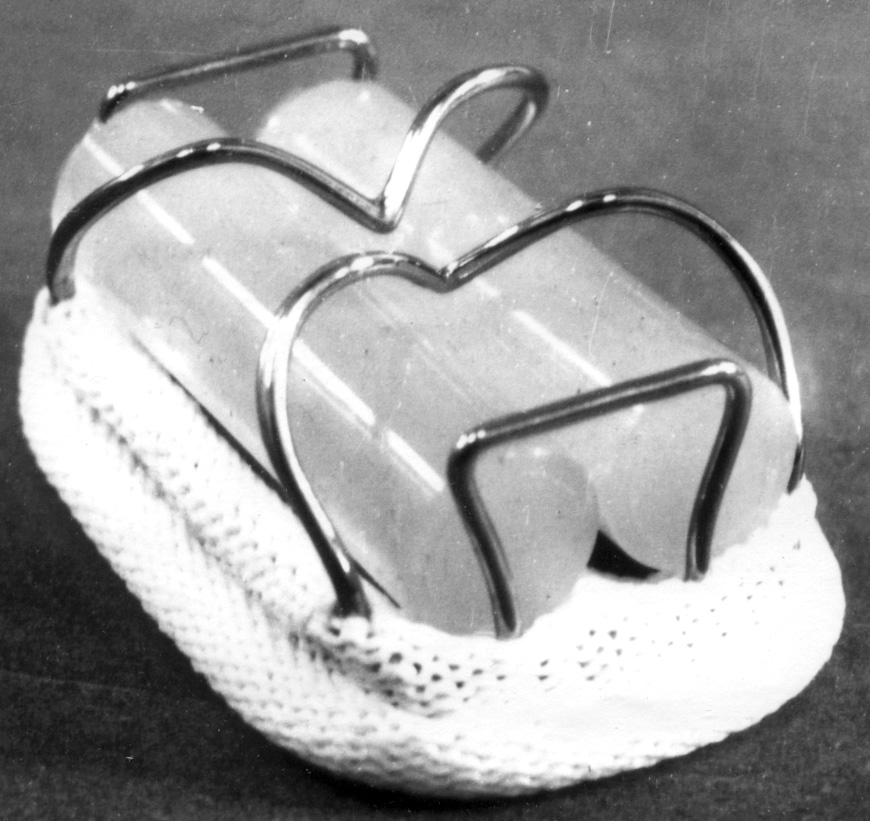 Искусственный клапан сердца ТКЧ-10